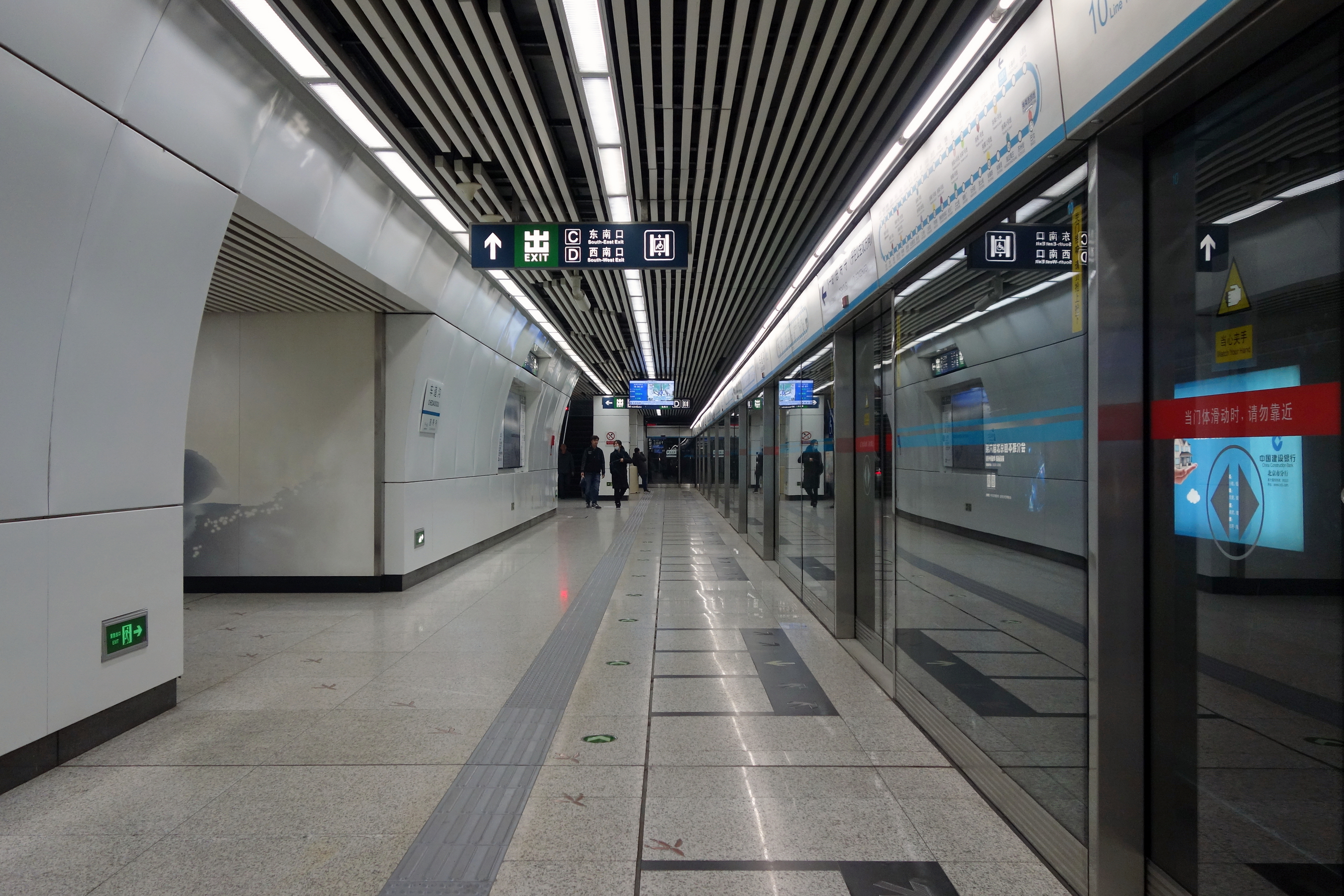 北京地铁10号线车道沟站分离式岛式站台。